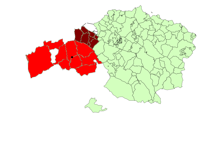 Los municipios que pertenecen o han pertenecido a las Encartaciones